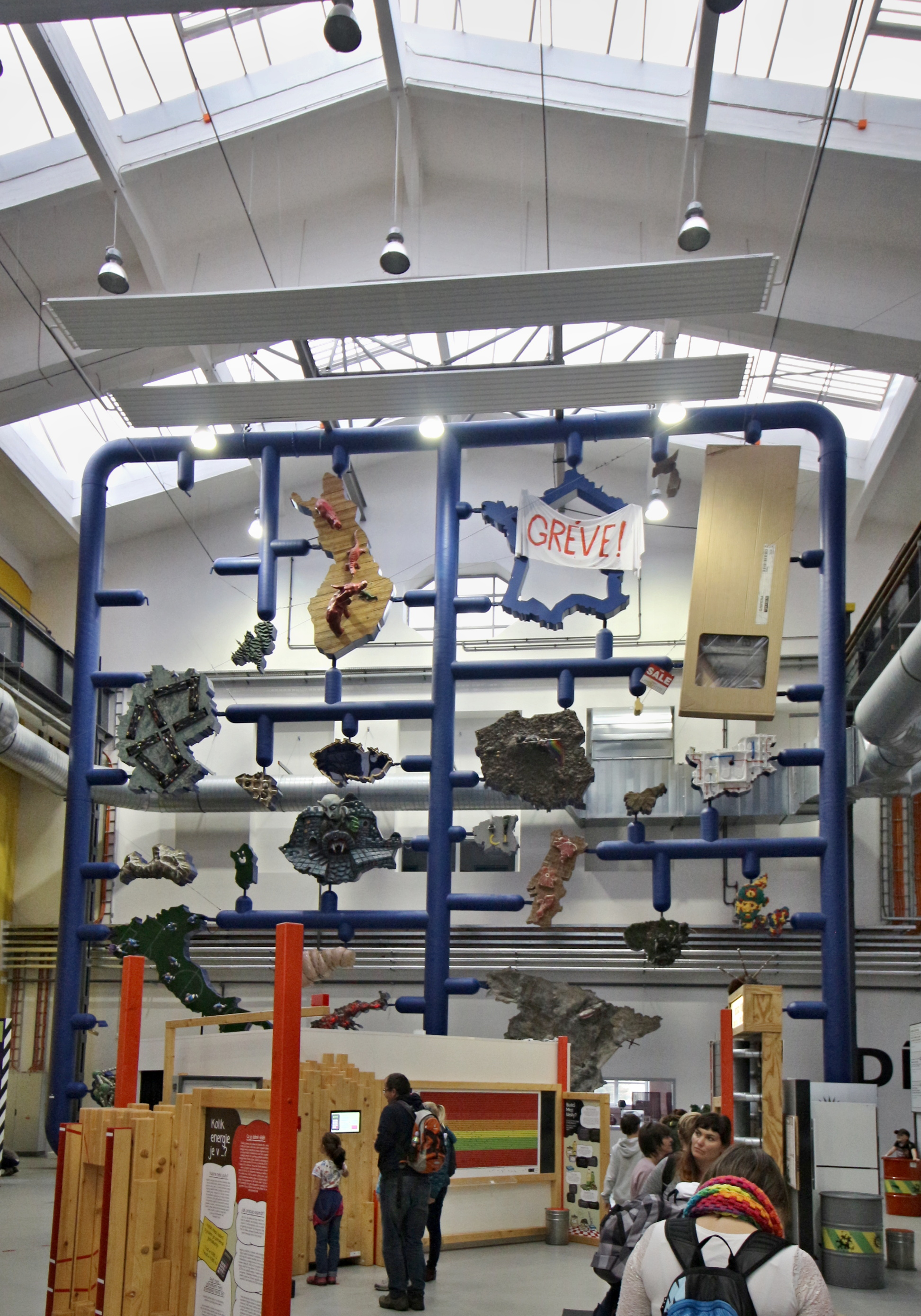 Plzeň TechMania